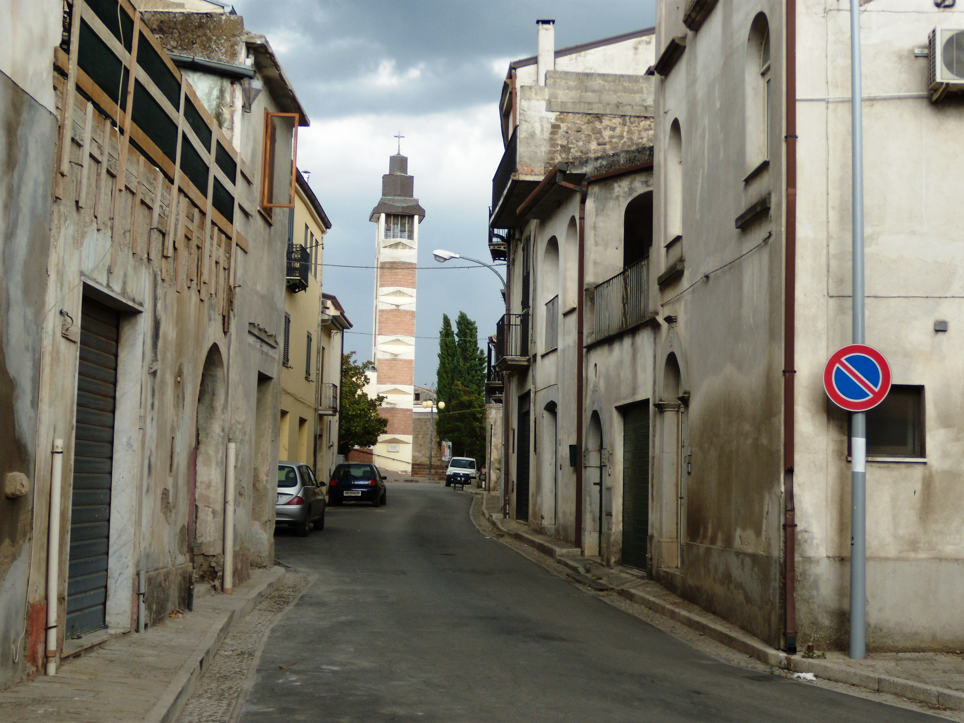 Scorcio di Puglianello con sullo sfondo il campanile della Chiesa parrocchiale.